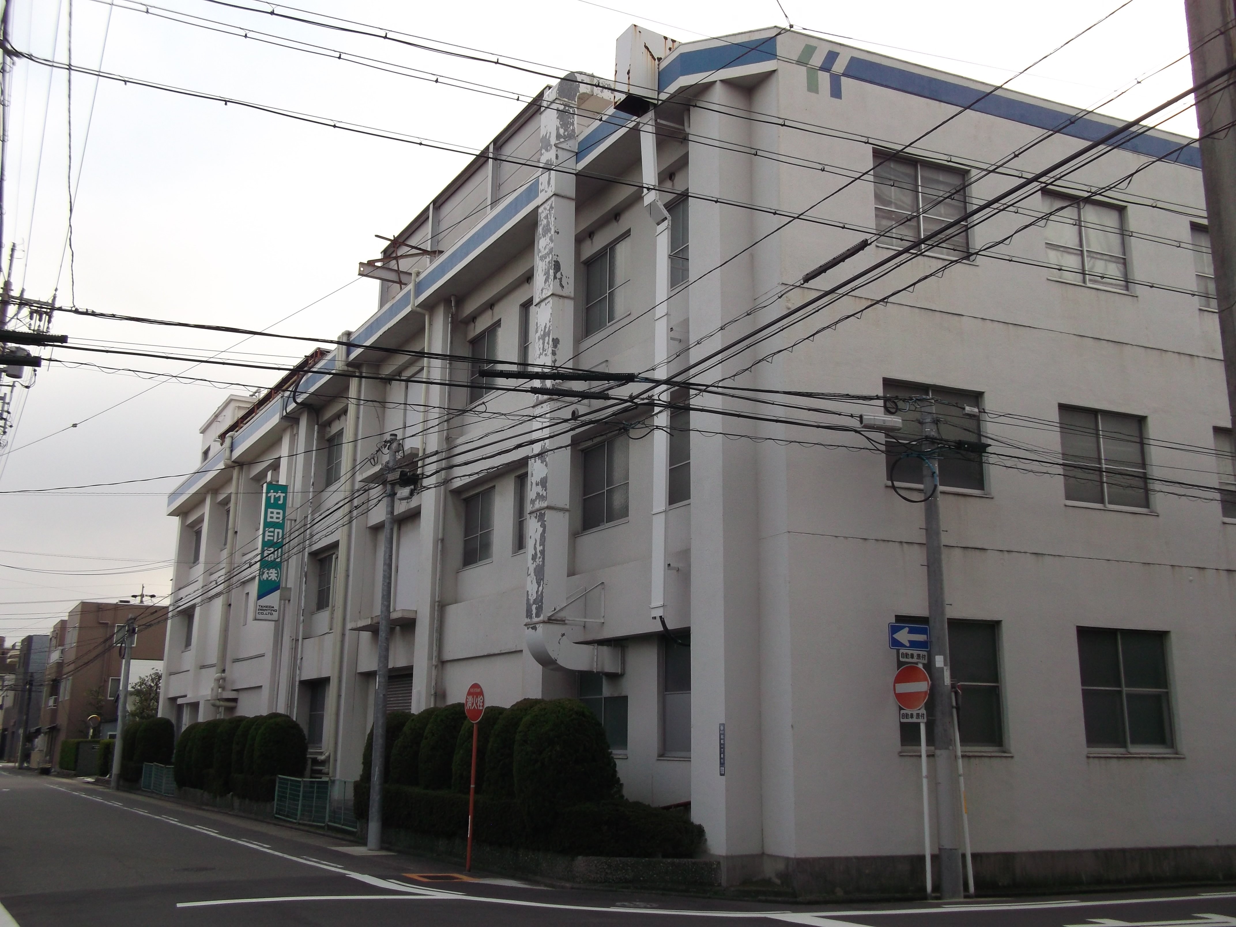 名古屋市昭和区白金一丁目の竹田印刷本社を東側公道北側より撮影